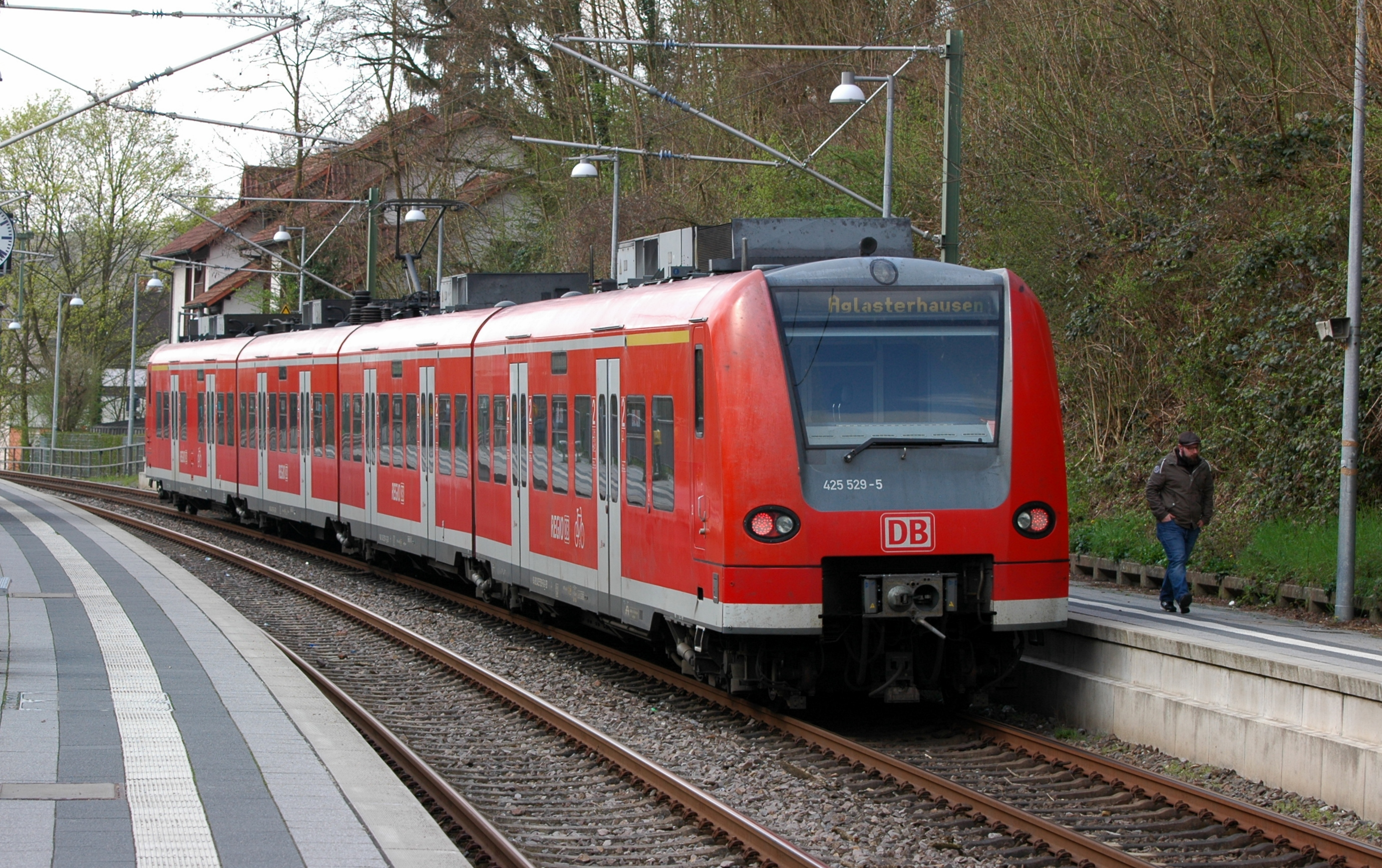 Bammental - Haltestelle Reilsheim - Baureihen 425-529